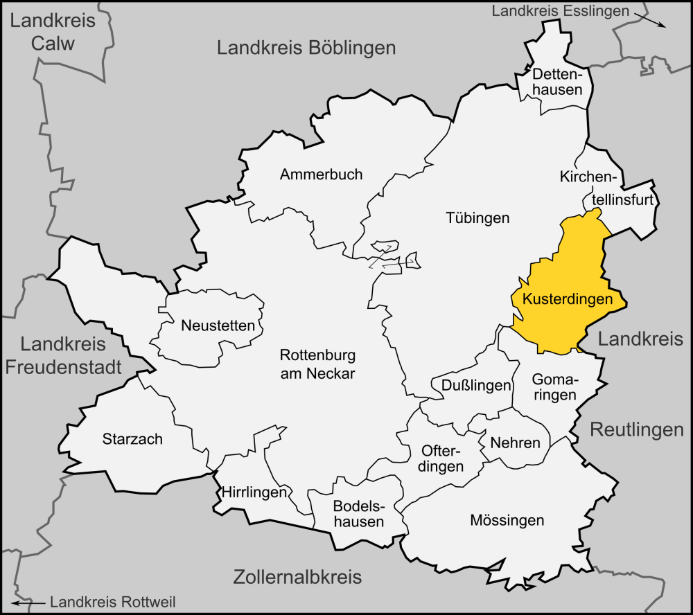 Karte der Gemeinde Kusterdingen im Landkreis Tübingen